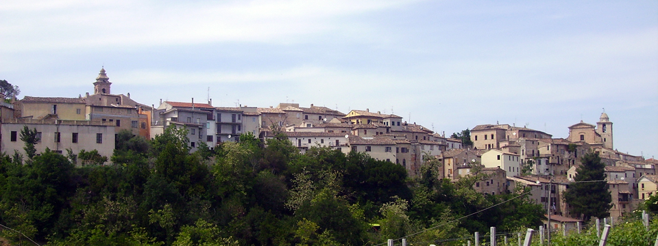 Panorama di Ortezzano (FM)